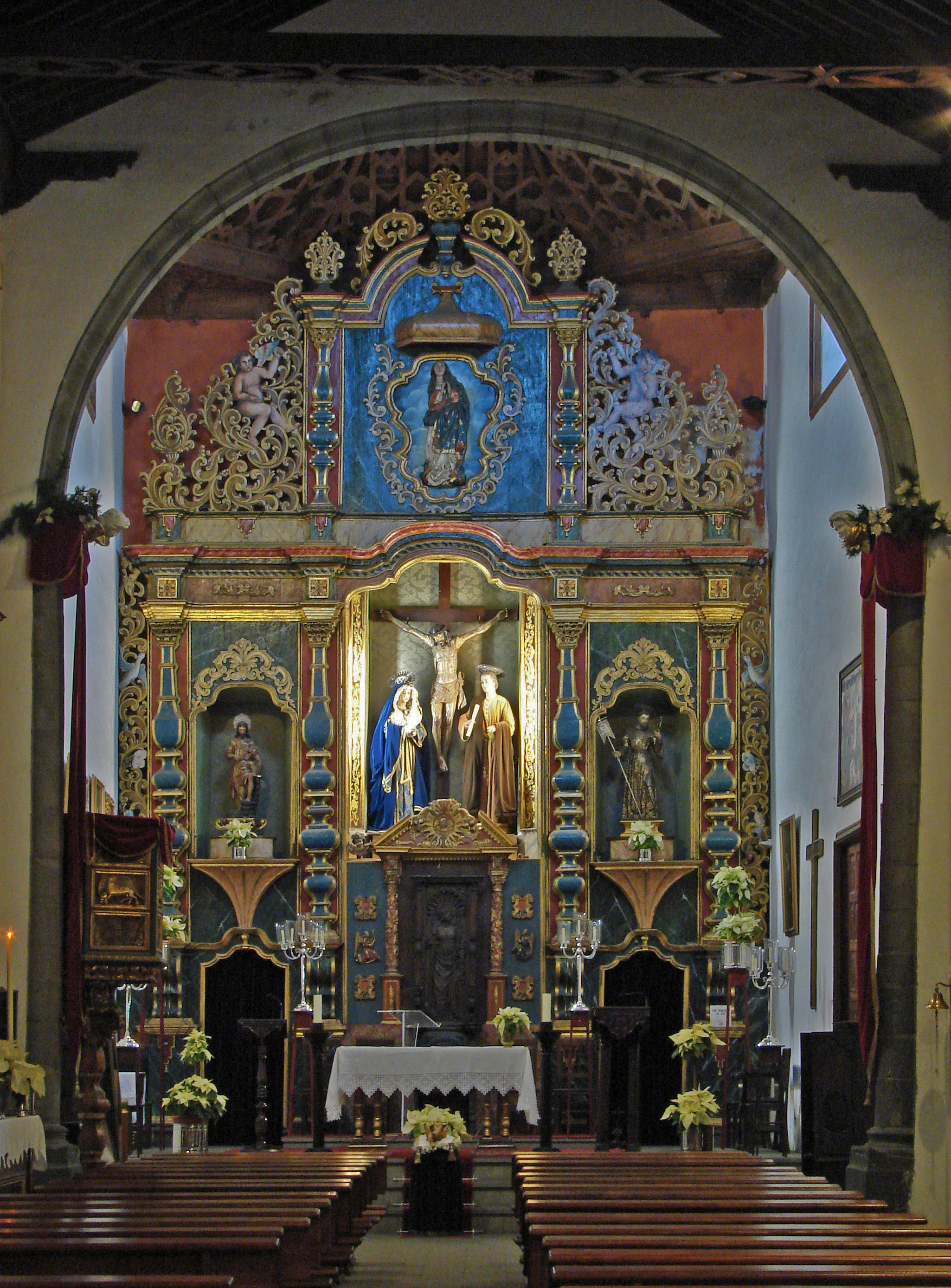 Hauptaltar der Kirche San Francisco in Puerto de la Cruz, Teneriffa, Spanien